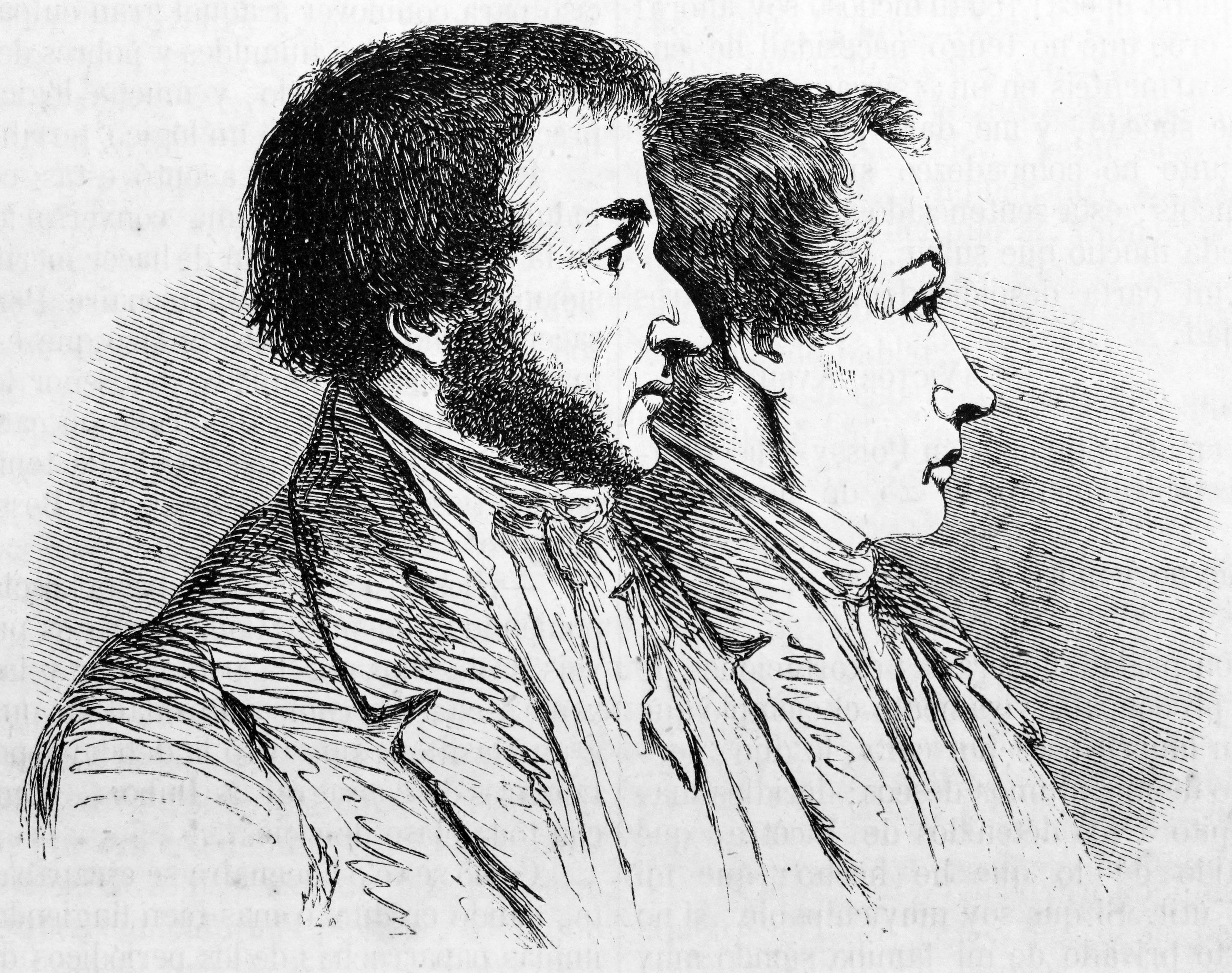 Robos y asesinatos por Lacenaire, Francois y Avril. "Avril y Francois." Ilustraciones de la obra : Anales dramáticos del crimen ó Causas célebres españolas y estranjeras [sic] / estractadas [sic] de los originales y traducidas, bajo la dirección de José de Vicente y Caravantes. - Madrid : Imprenta de Fernando Gaspar [etc.], 1858-1866. - Ed. il. con grabados...